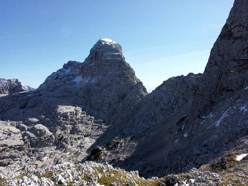 Stadelhorn, Reiter Alpe, Reiteralm, Bavaria, Germany, author: Anton Huber